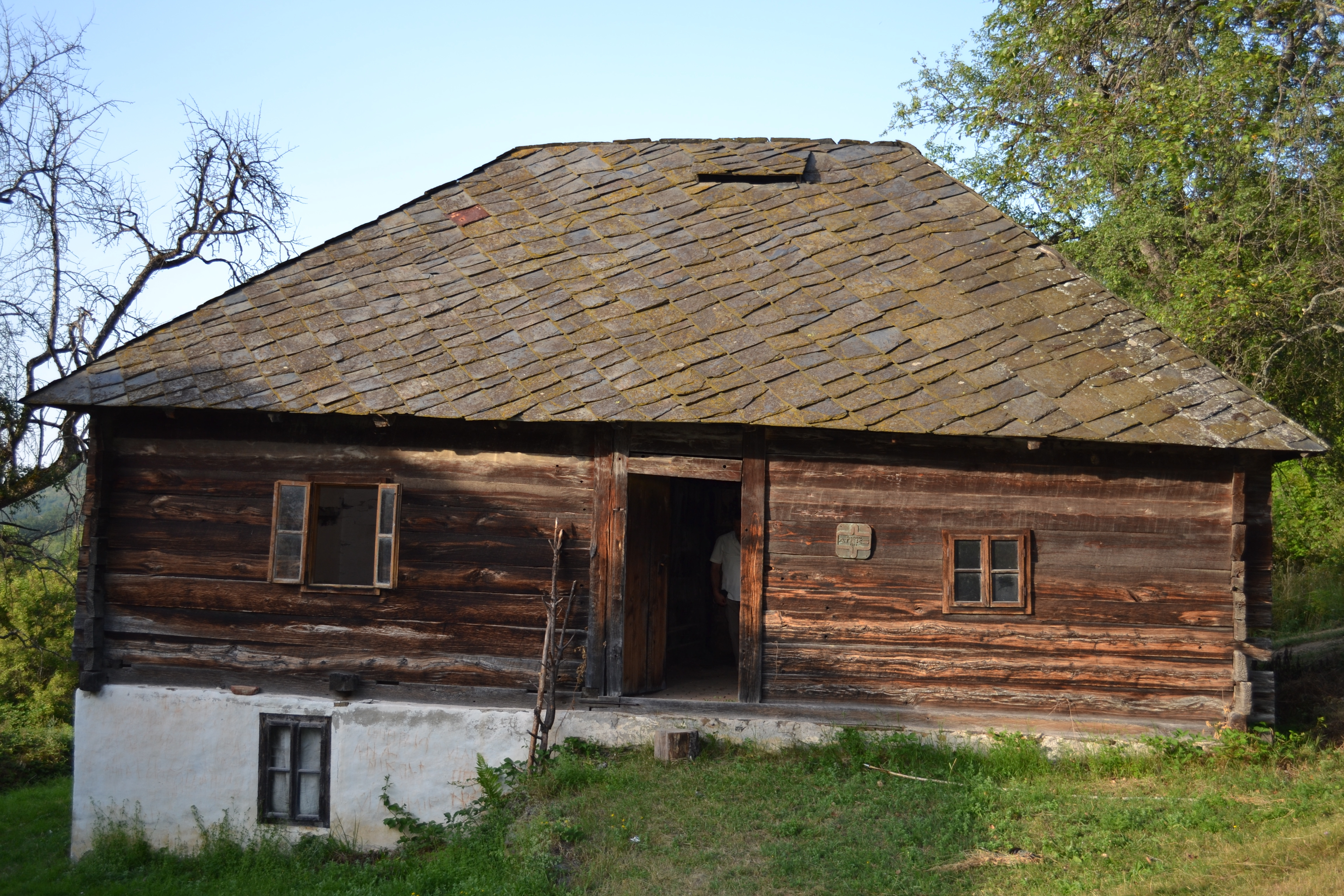 Stara škola u Milandži